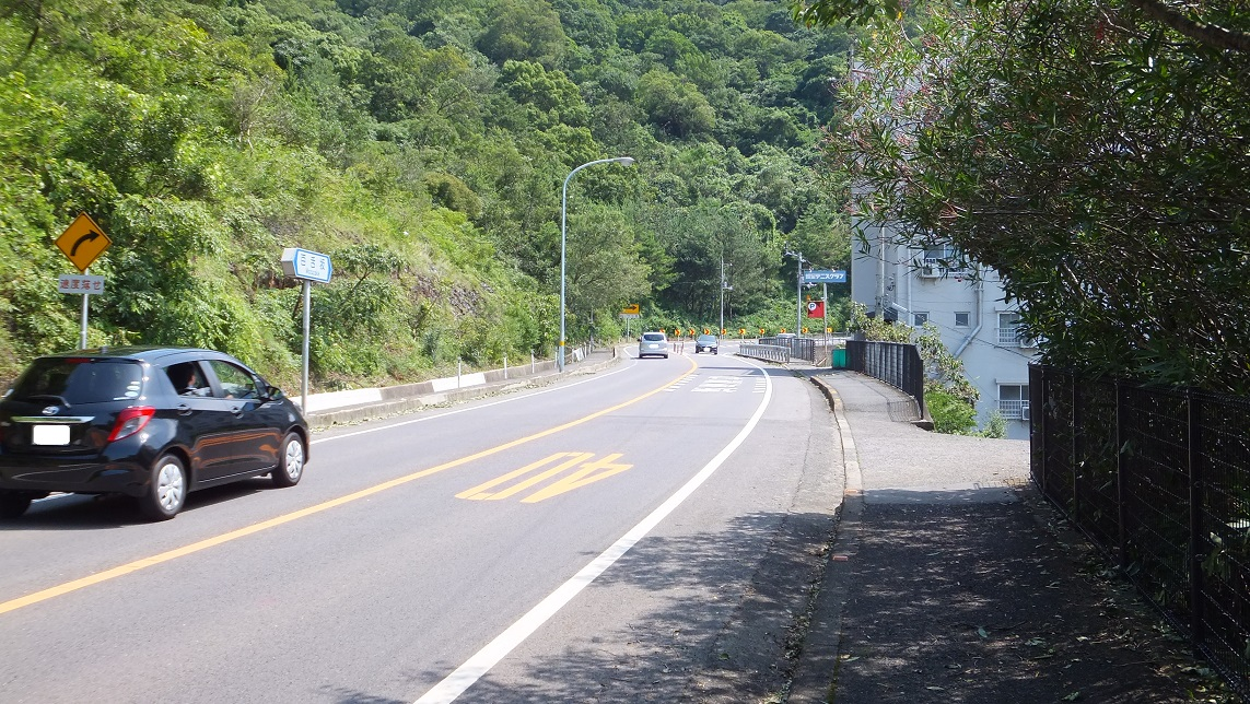 香川県高松市宮脇町２丁目 香川県道172号 百舌坂中腹 終点側より